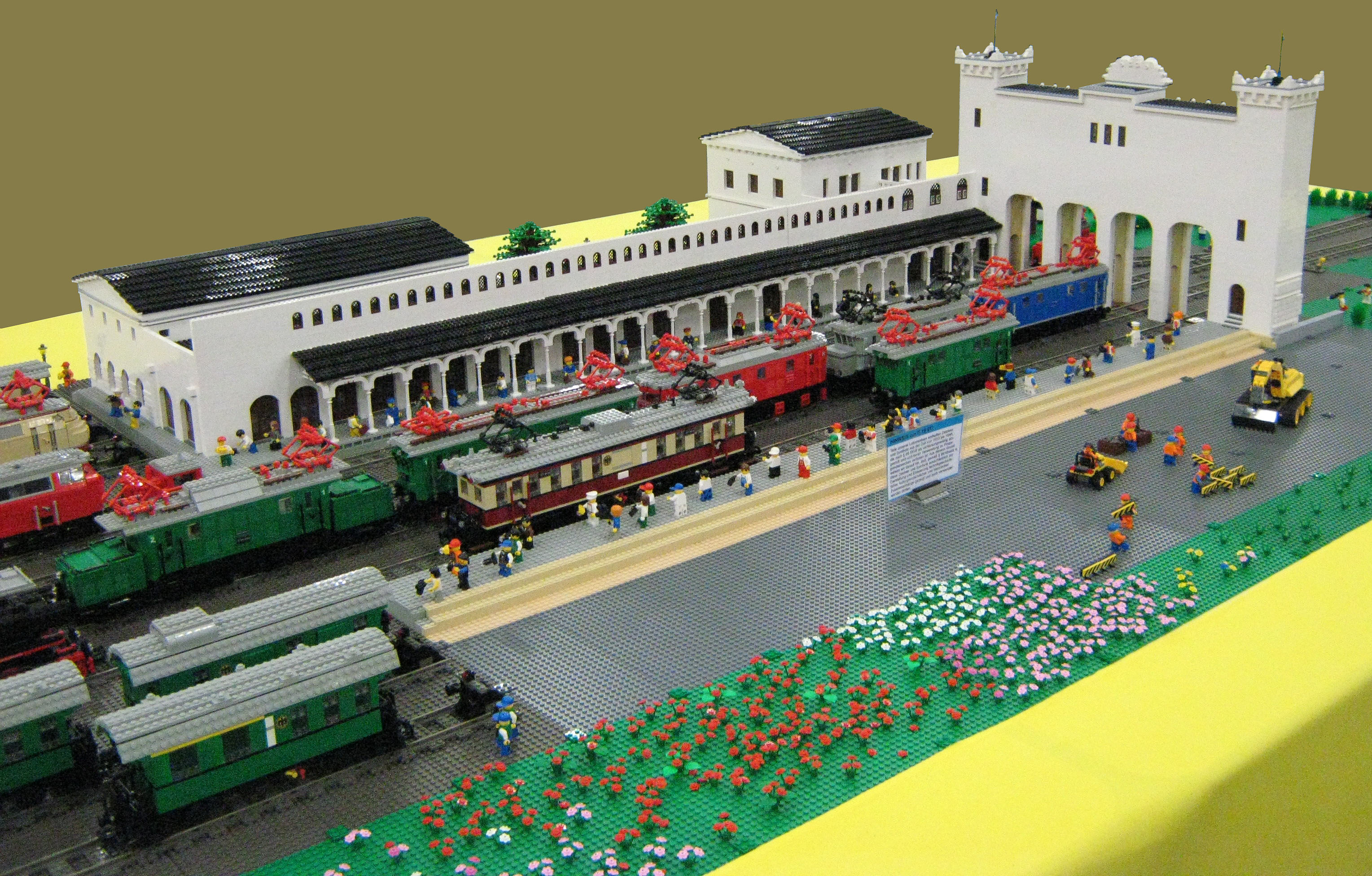 LEGO-Fanwelt 2008 in der Kölner Messe Der Leipzig Bayerische Bahnhof als LEGO-Modell